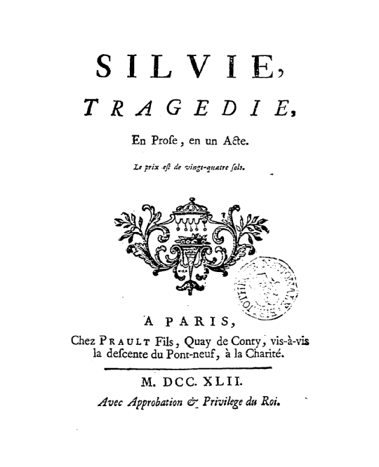 Paul Landois, Silvie (Title page)